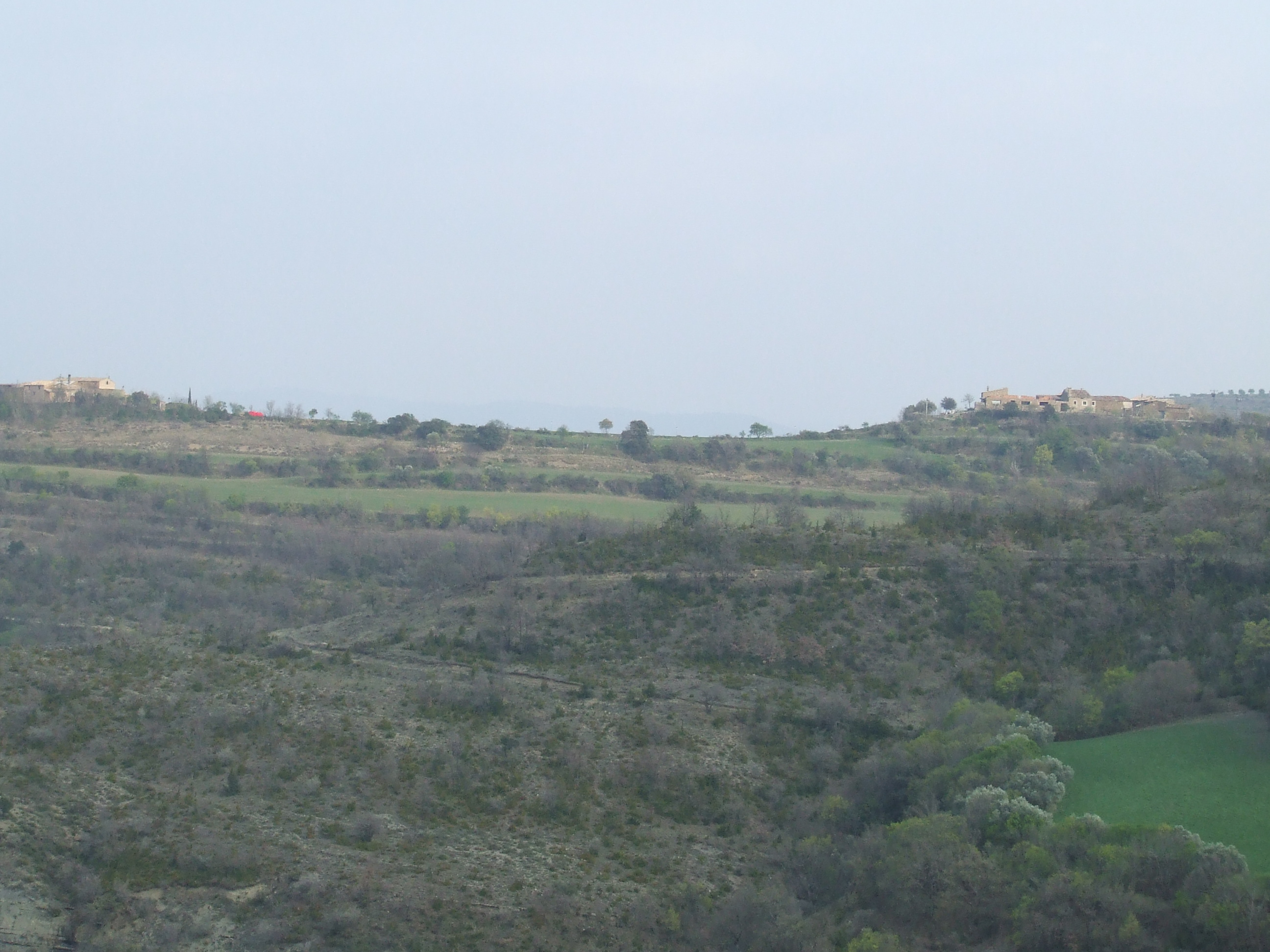 Vista de Vilamolat de Mur des de ponent (Mur, Castell de Mur, Pallars Jussà)